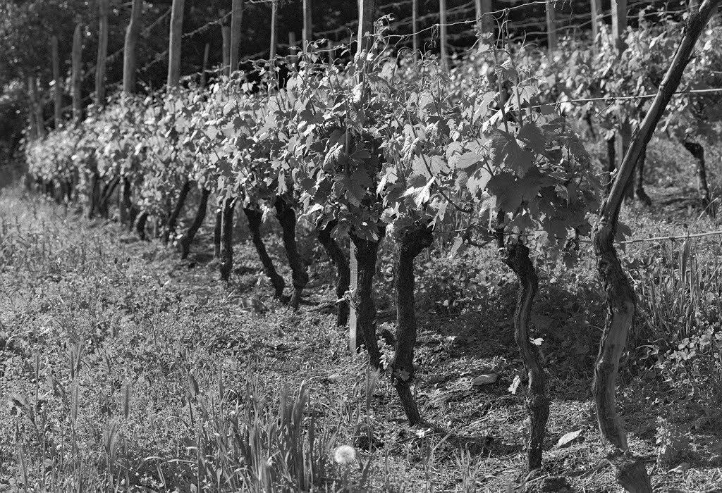 Rivera di Almese, Vigna Baratuciat primavera 2013